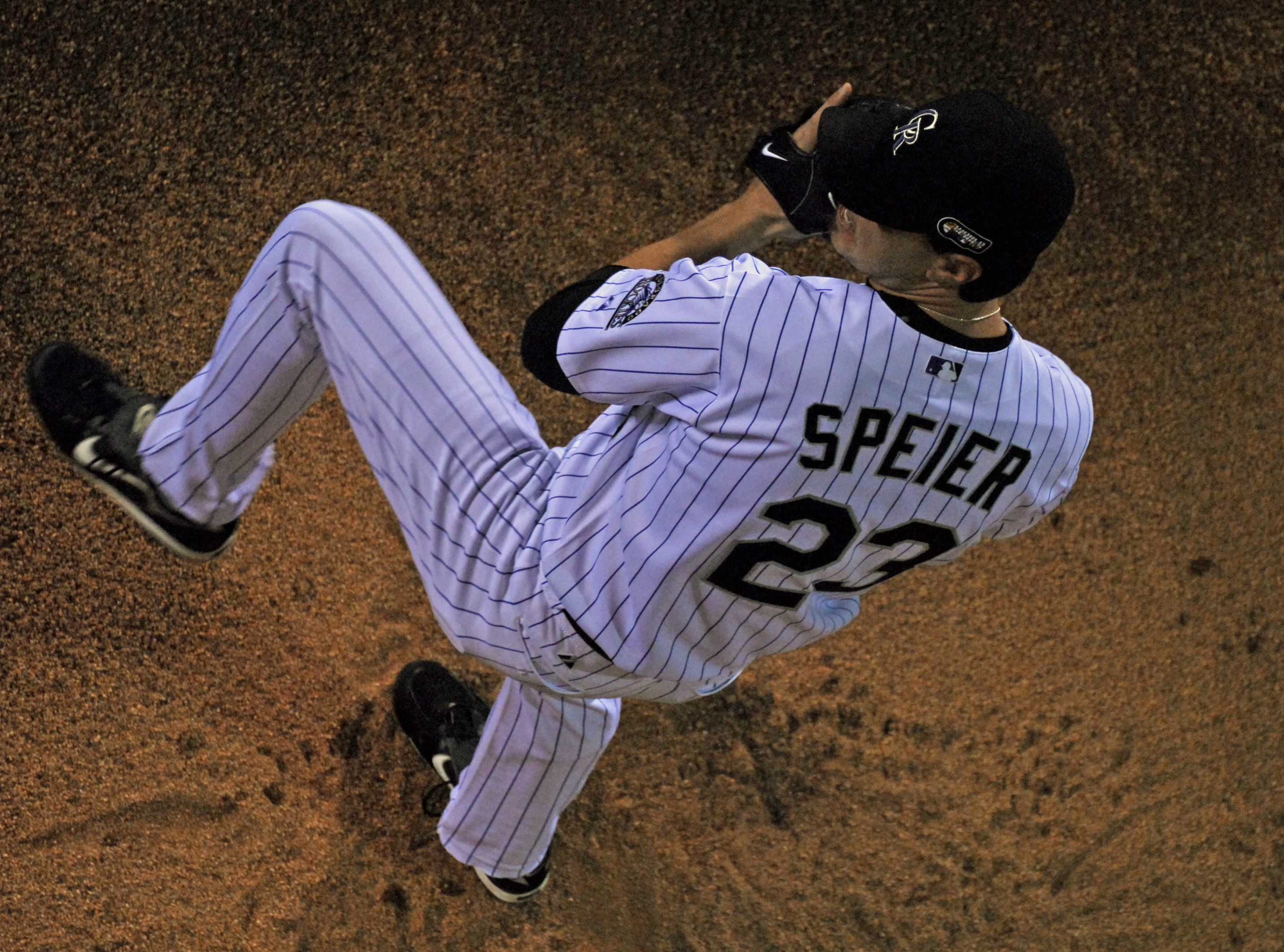 Ryan Speier